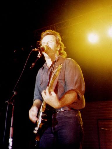 Phil Fasan en concert à Brême (Allemagne).